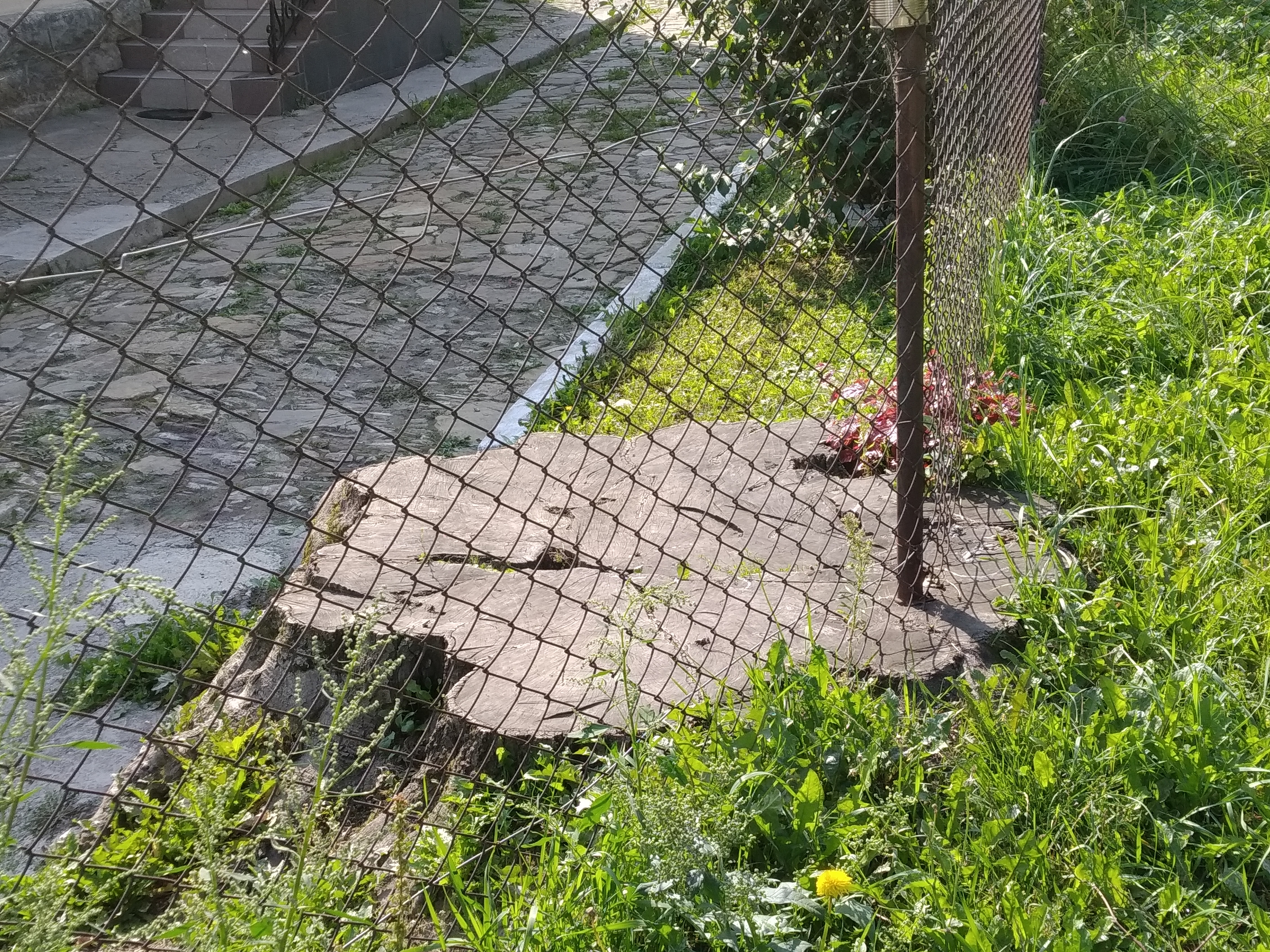 Залишки (пень) бука червонолистої форми в м. Добромиль, на вул. Галицькій, 28 (серпень 2019).